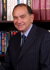 American diplomat Ambassador Edward Djerejian